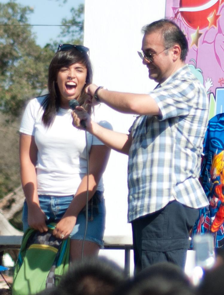 Mario Castañeda en TKT en 2012 con una chica para el reto "El grito más largo".